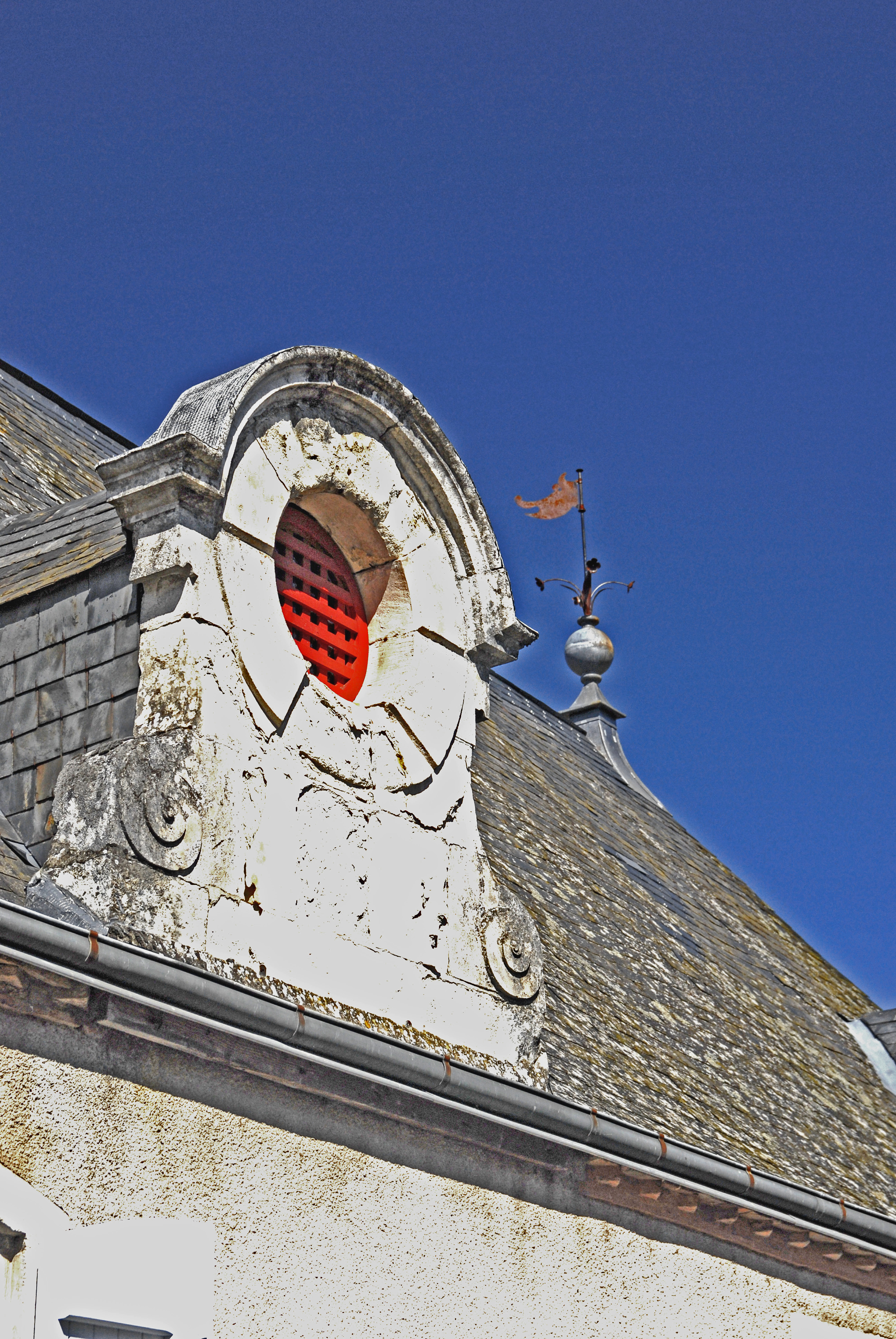 Angles-sur-l'Anglin, Dachgaube im Renaissance- Stil